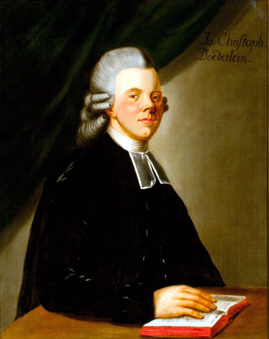 Johann Christoph Döderlein (1745-1792) deutscher evangelischer Theologe